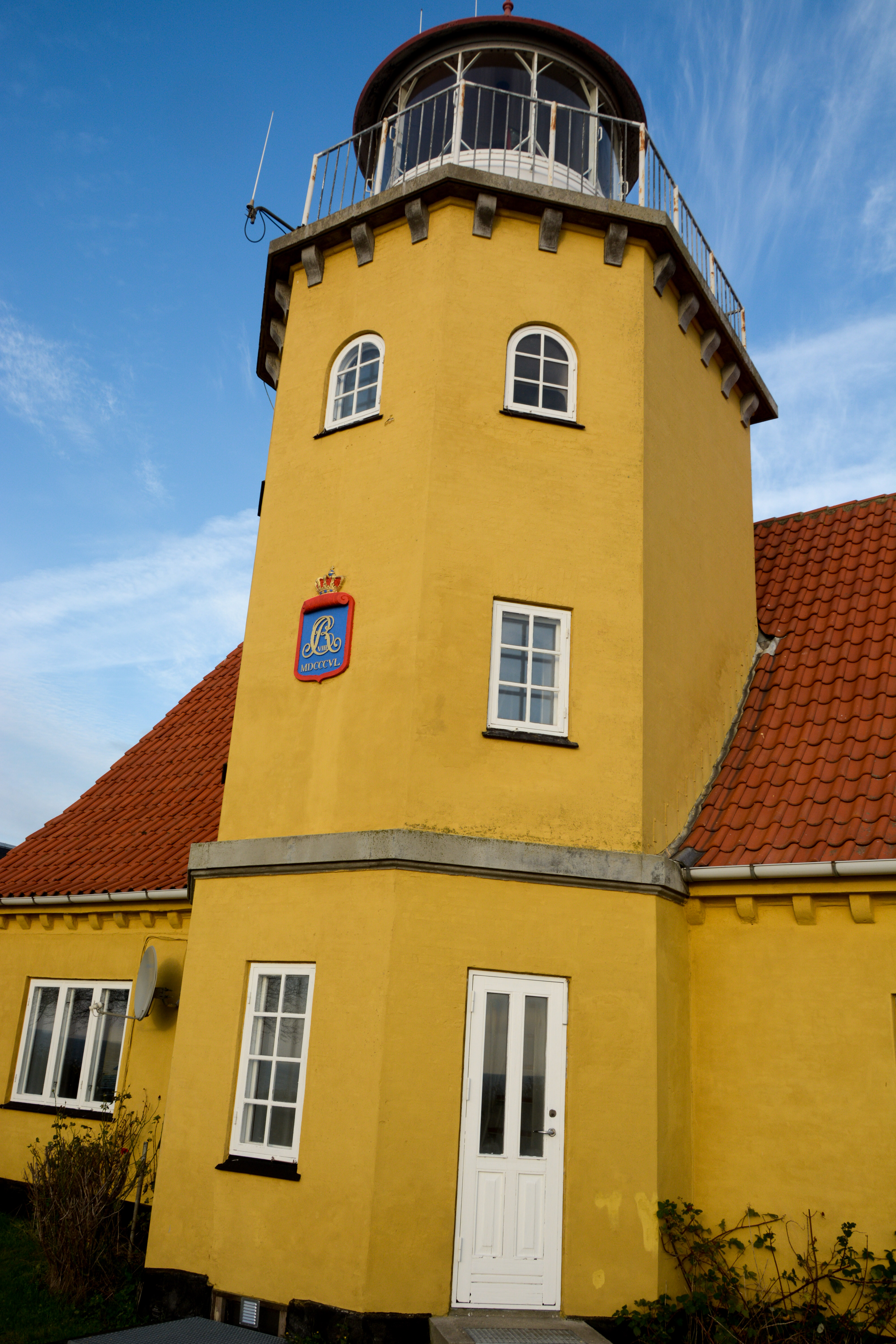 Møn's fyr